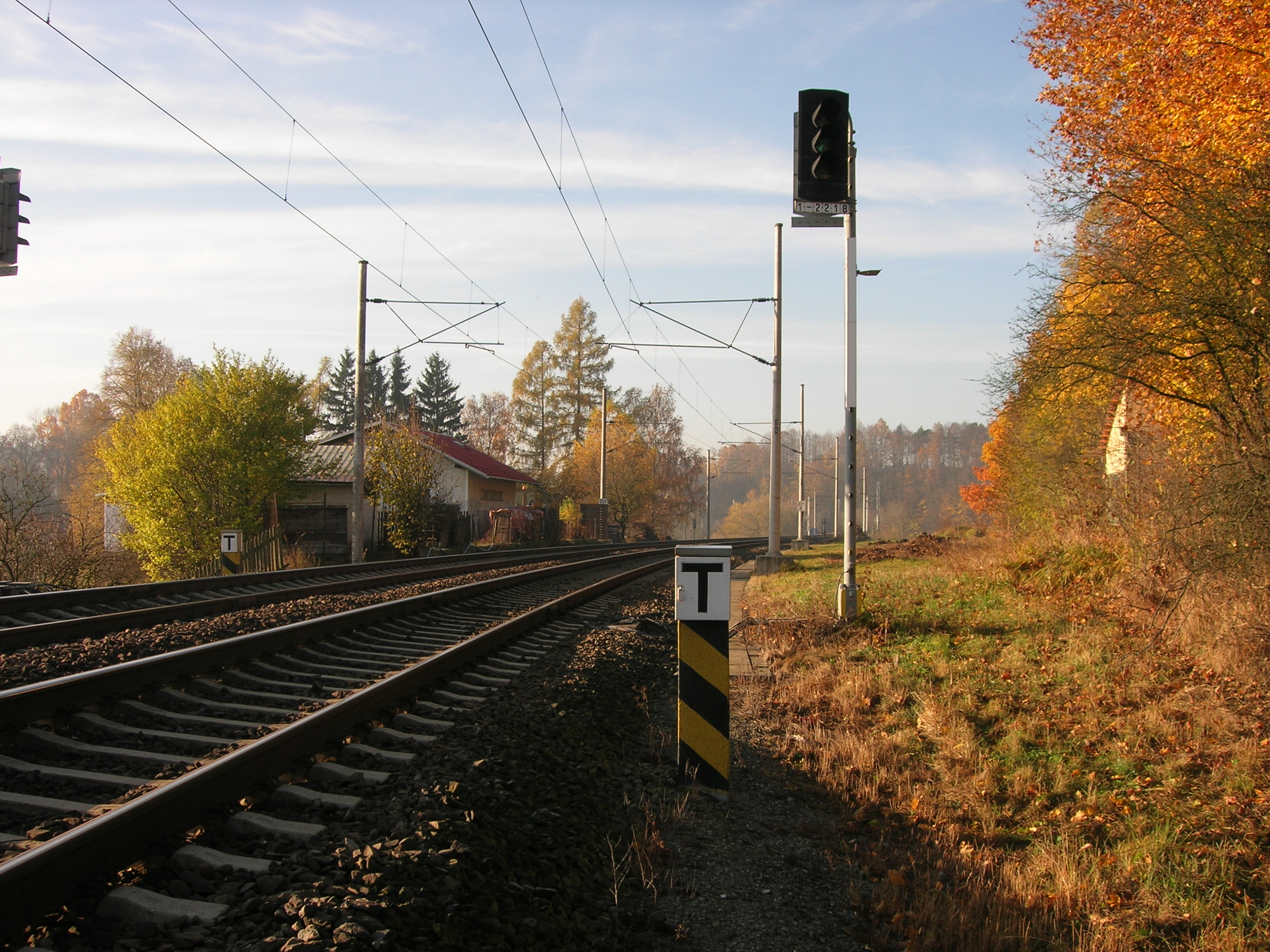 Autoblokové návěstidlo nedaleko Svitav na trati Brno - Česká Třebová